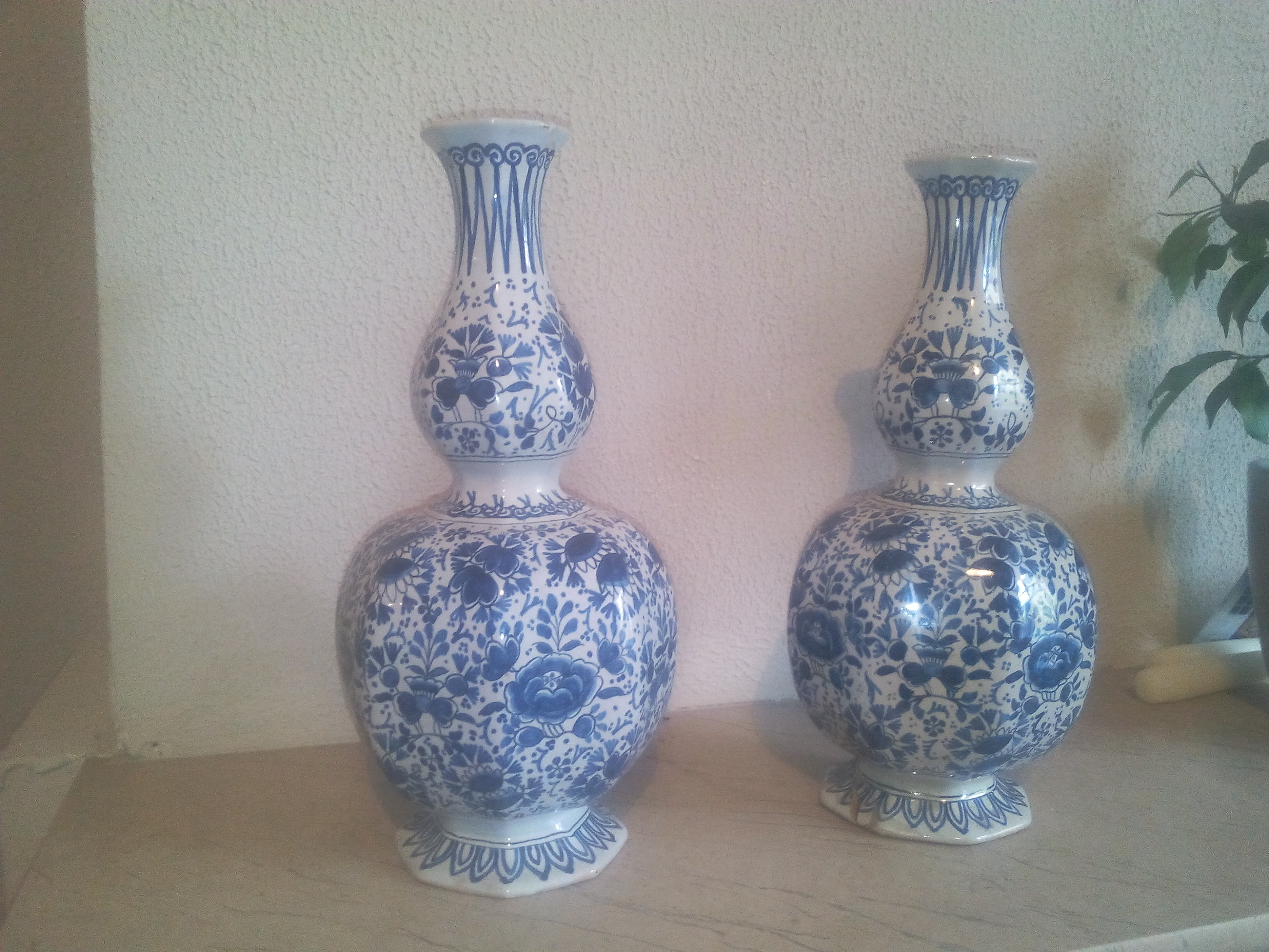 Céramique traditionnelle française du XXème siècle présentant des motifs fleuris